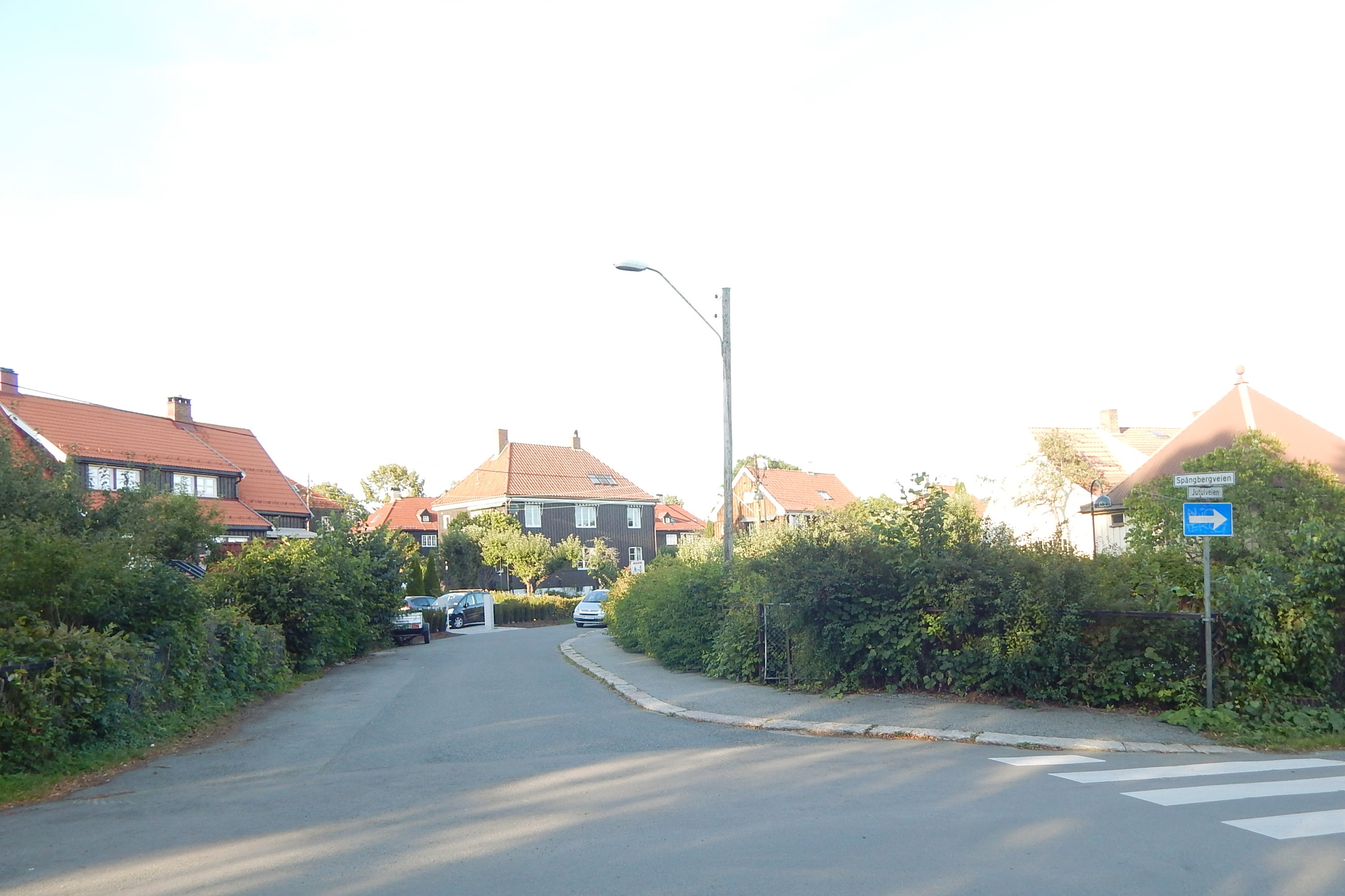 Spångbergveien sett fra Jutulveien